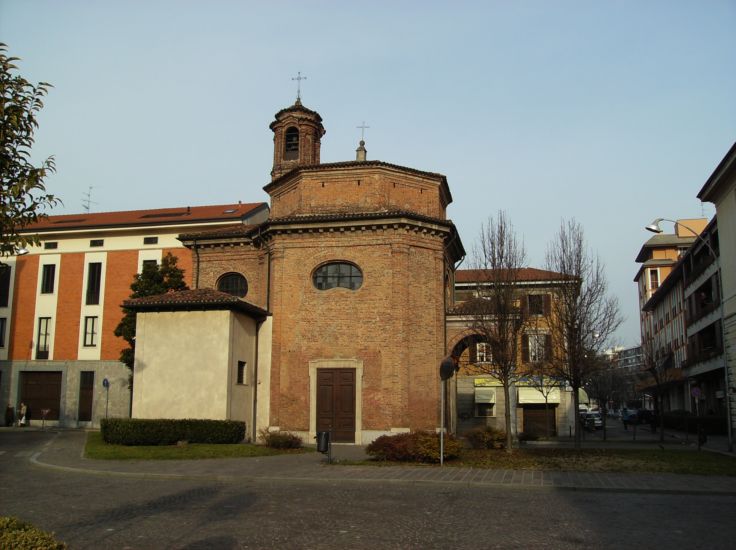 Madonna delle Grazie (Busto Arsizio)